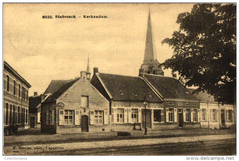 Stabroeck Kerkendam